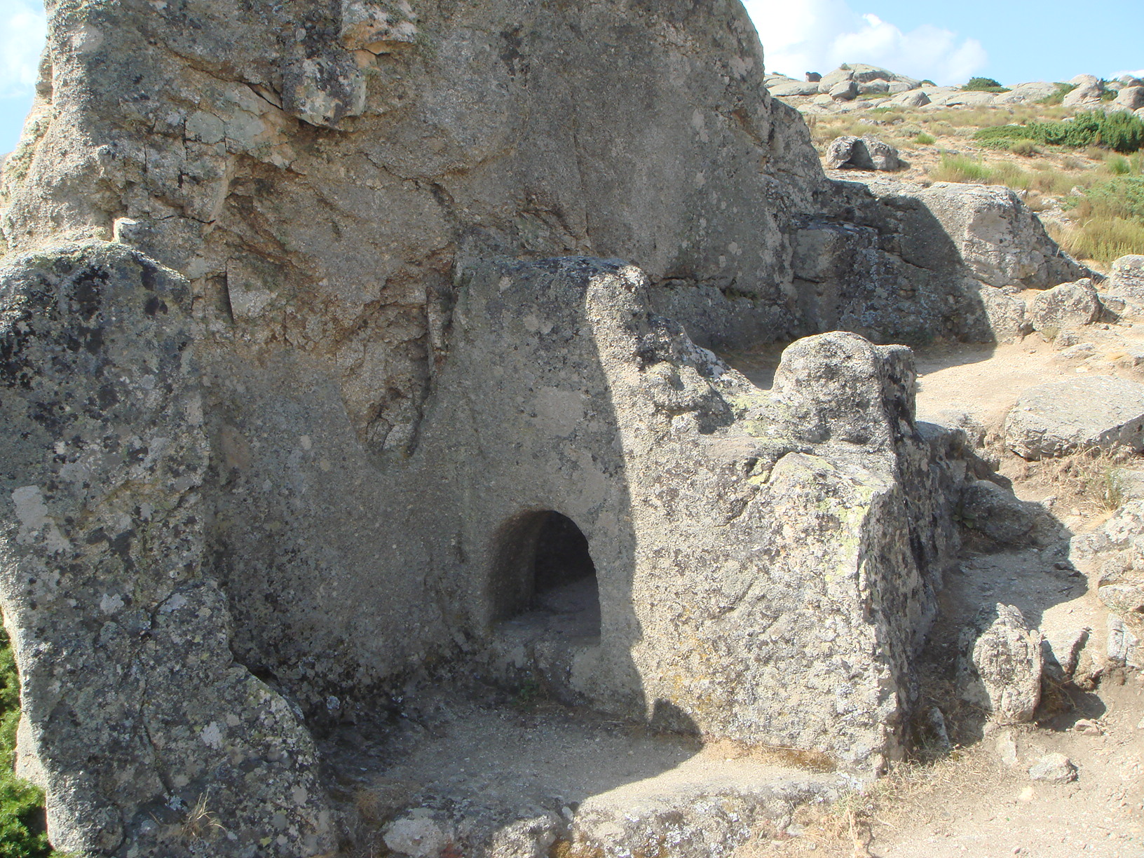 Sauna del Castro de Ulaca, Villaviiosa, (Ávila), España